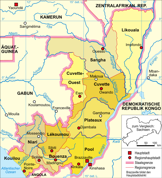 Politische Karte der Republik Kongo